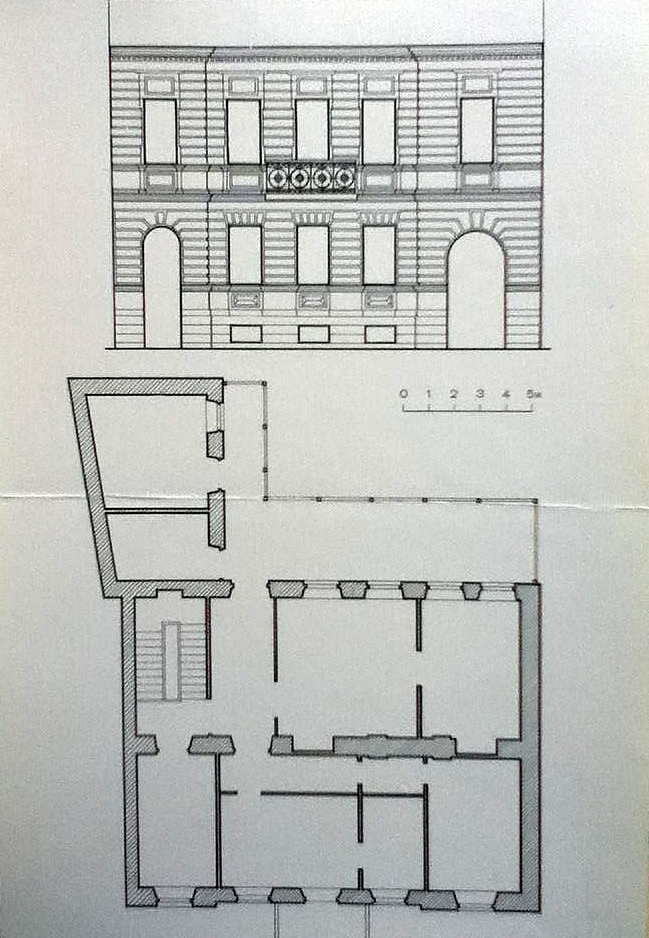 Ֆադեյ Քալանթարյանի բնակելի տան հատակագիծը